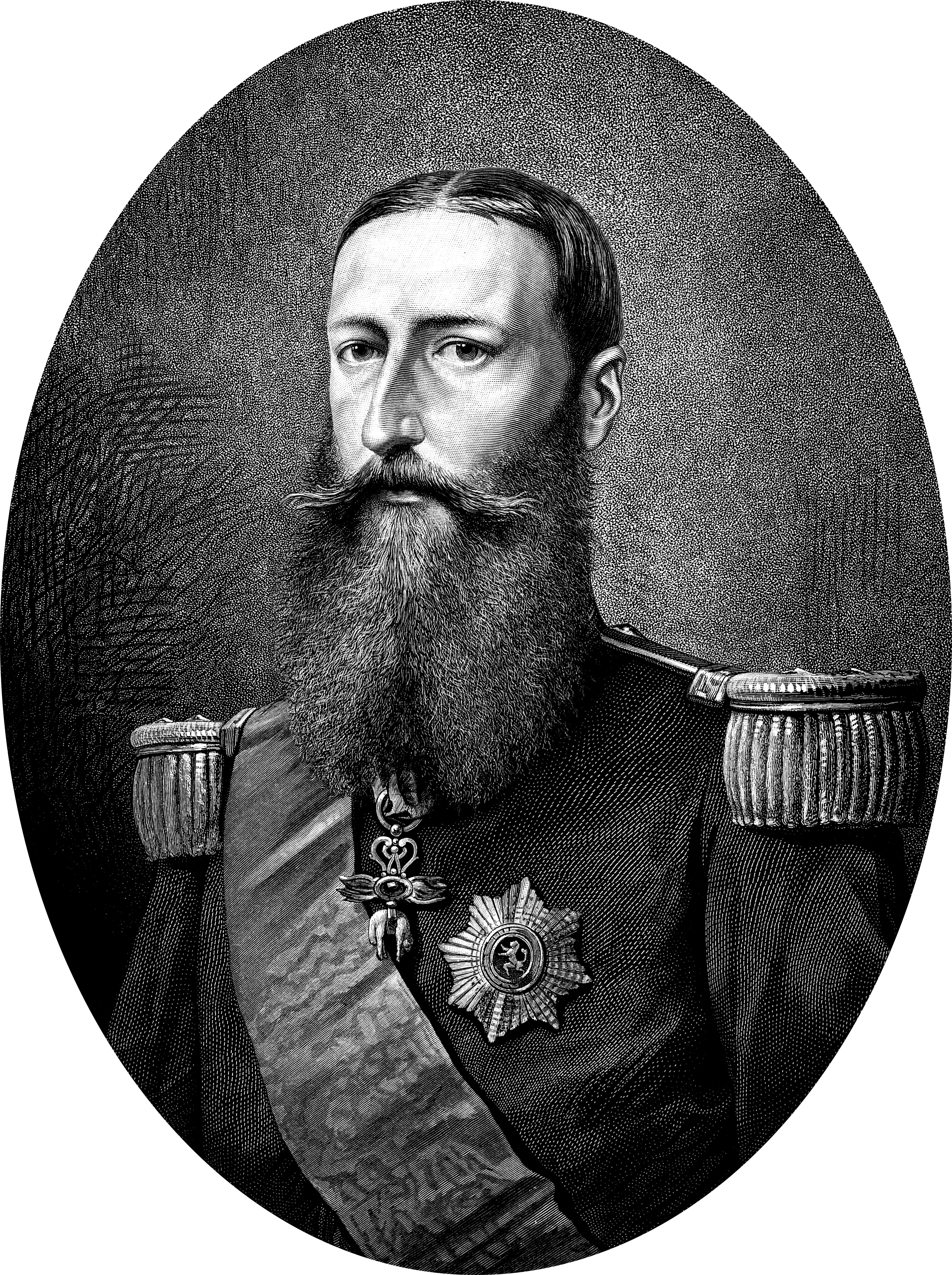 S.M. le roi Léopold II de Belgique. — Le Roi porte la grande tenue de lieutenant-général et les décorations de chevalier de l’ordre de la Toison d’or (en sautoir) et de grand cordon de l’ordre de Léopold (ruban en écharpe et plaque). Gravure d’après un détail d’une peinture (1880) d’Eugène Devaux (1822-1914).